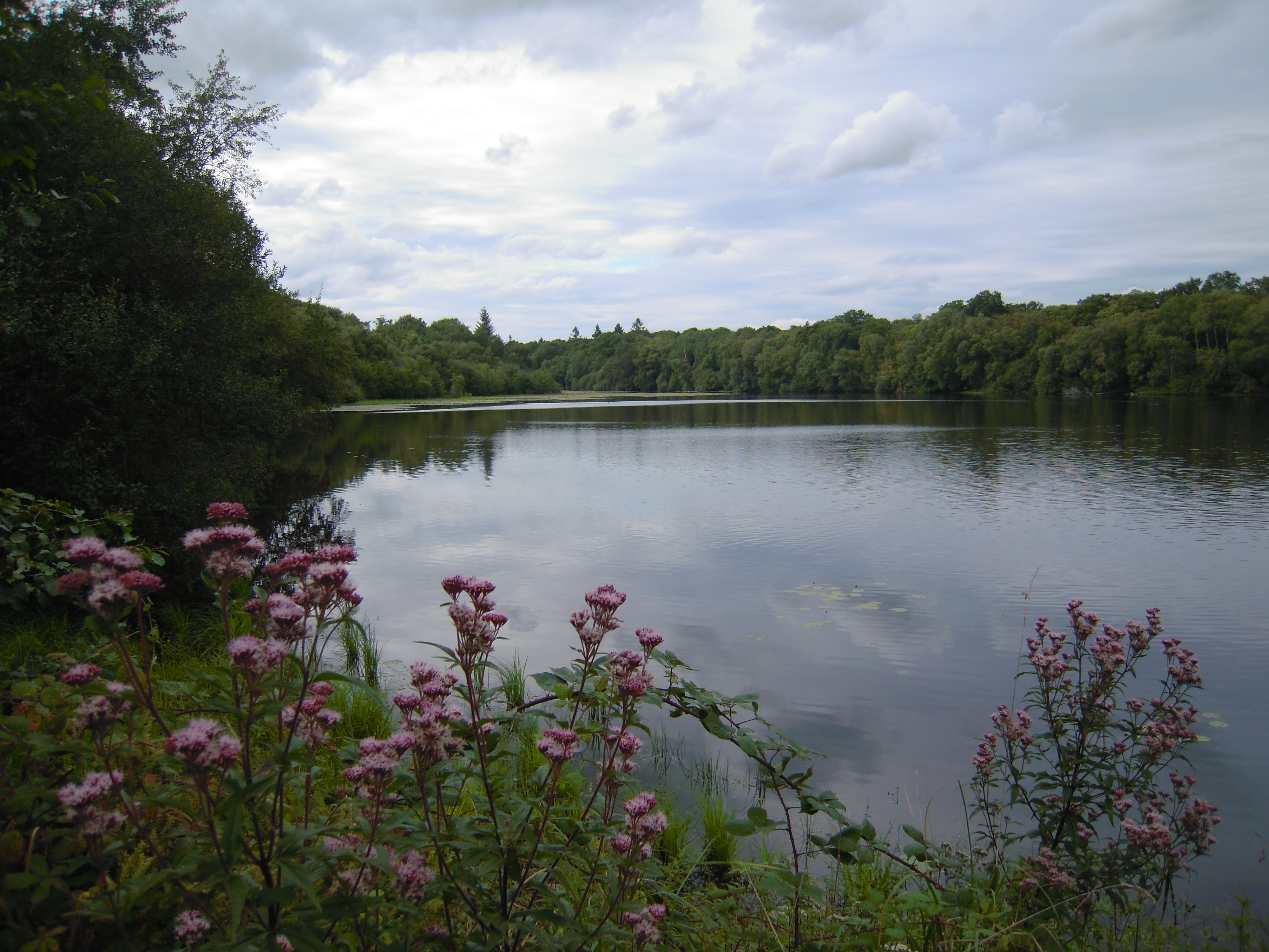 étang de la Corbière à Marpiré (ZNIEFF)